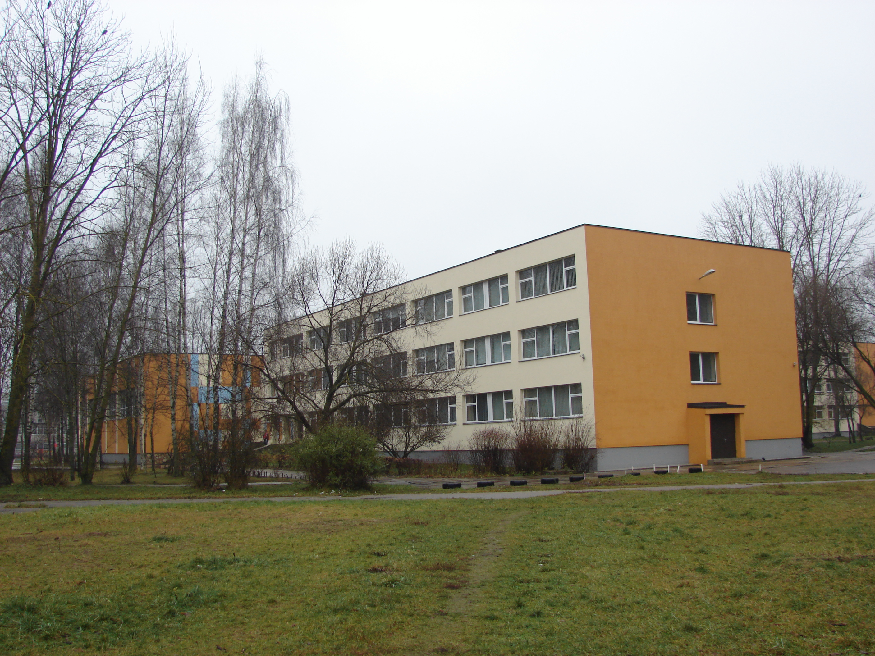 Rīgas Ostvalda vidusskola Dammes iela 20; Rīga, Latvia